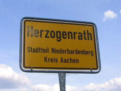 Dorfeingangsschild